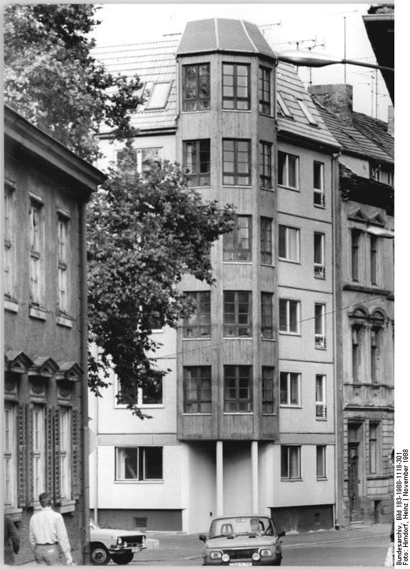 ADN-ZB-Hirndorf-18.11.1988- Von Erfurts ältester und zugleich jüngster Straße. Mit dieser schön gestalteten Eckfassade an der Augustinerstraße beginnt die Straße "Am Hügel", die äteste und zugleich jüngste in Erfurt.